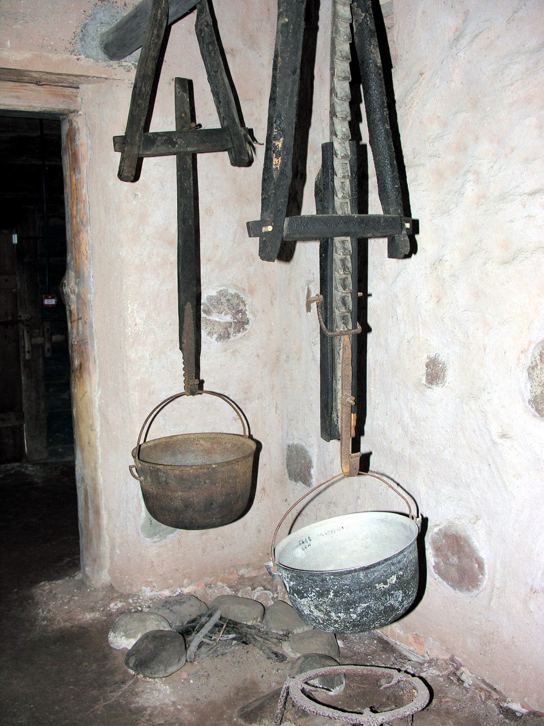 Vąškaras kamine 2007 m. balandžio 21 d., Lietuva